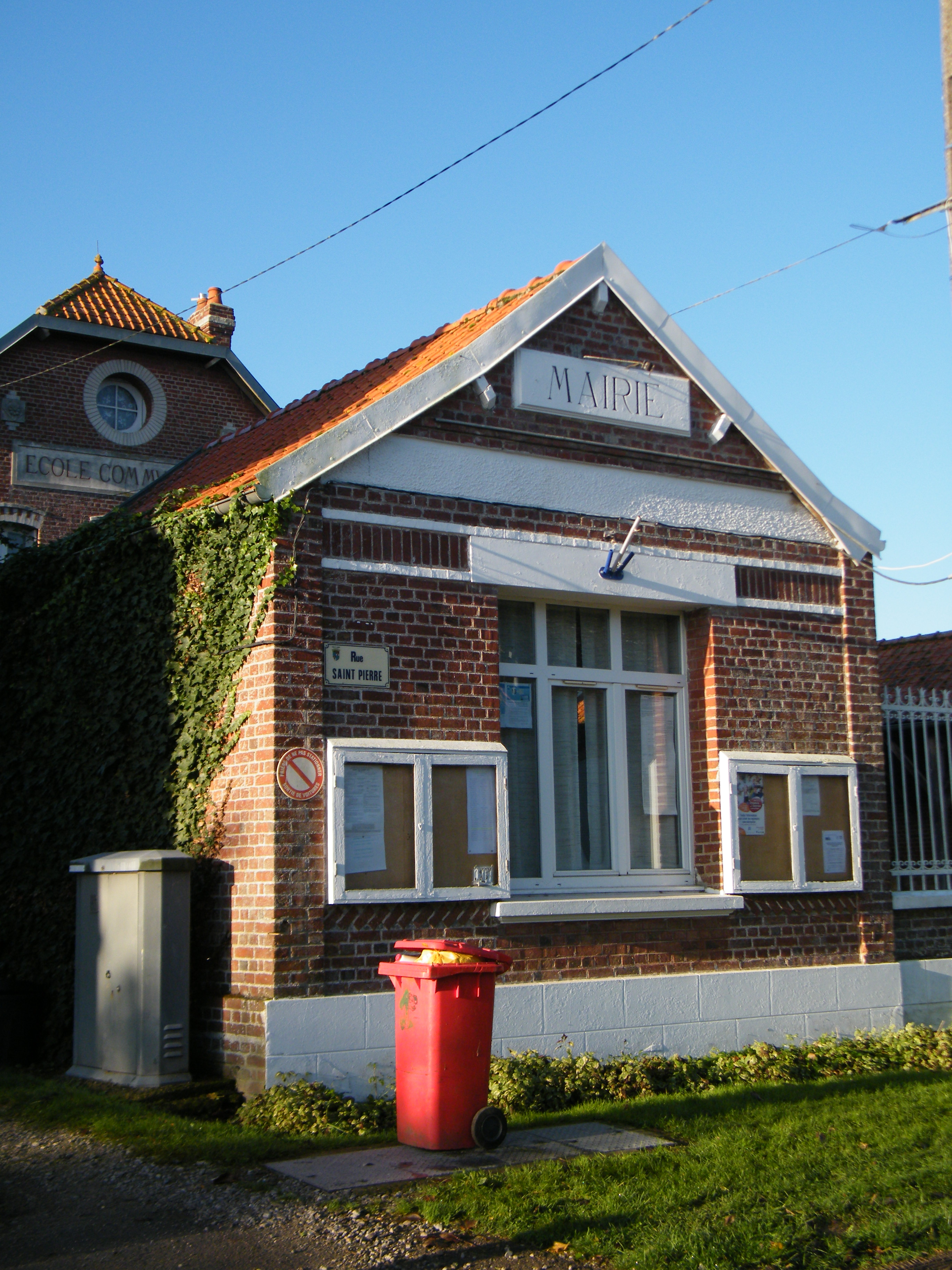 Mairie de Mesnil-Saint-Georges, Somme, France.